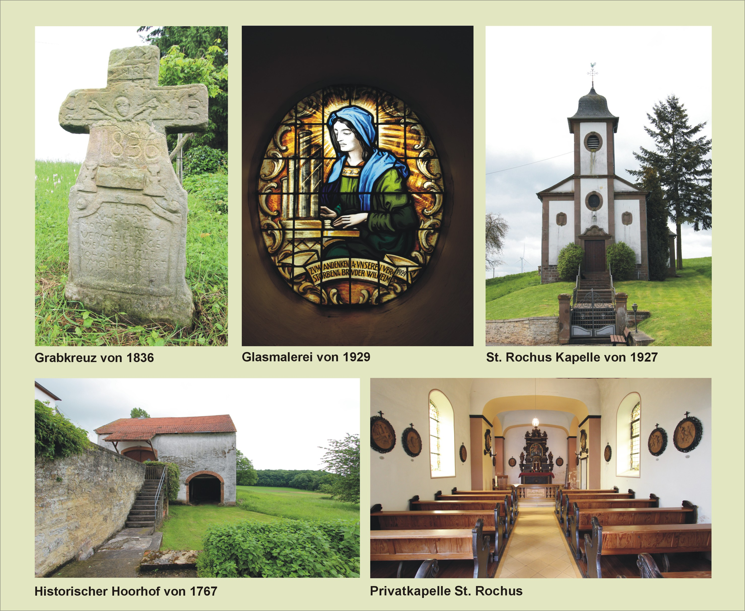 D-54646 Olsdorf; Sehenswürdigkeiten. Aufnahmen von 2016.